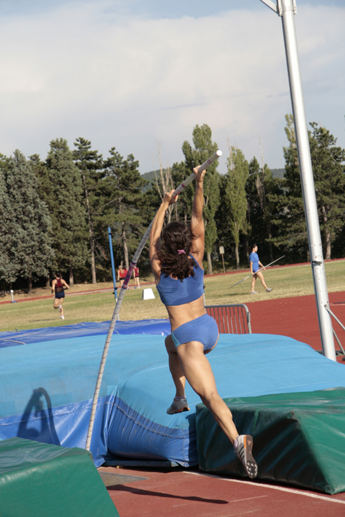 Scattata da Nefersaur sequenza pole vault 2 (Anna Giordano Bruno) Licenza